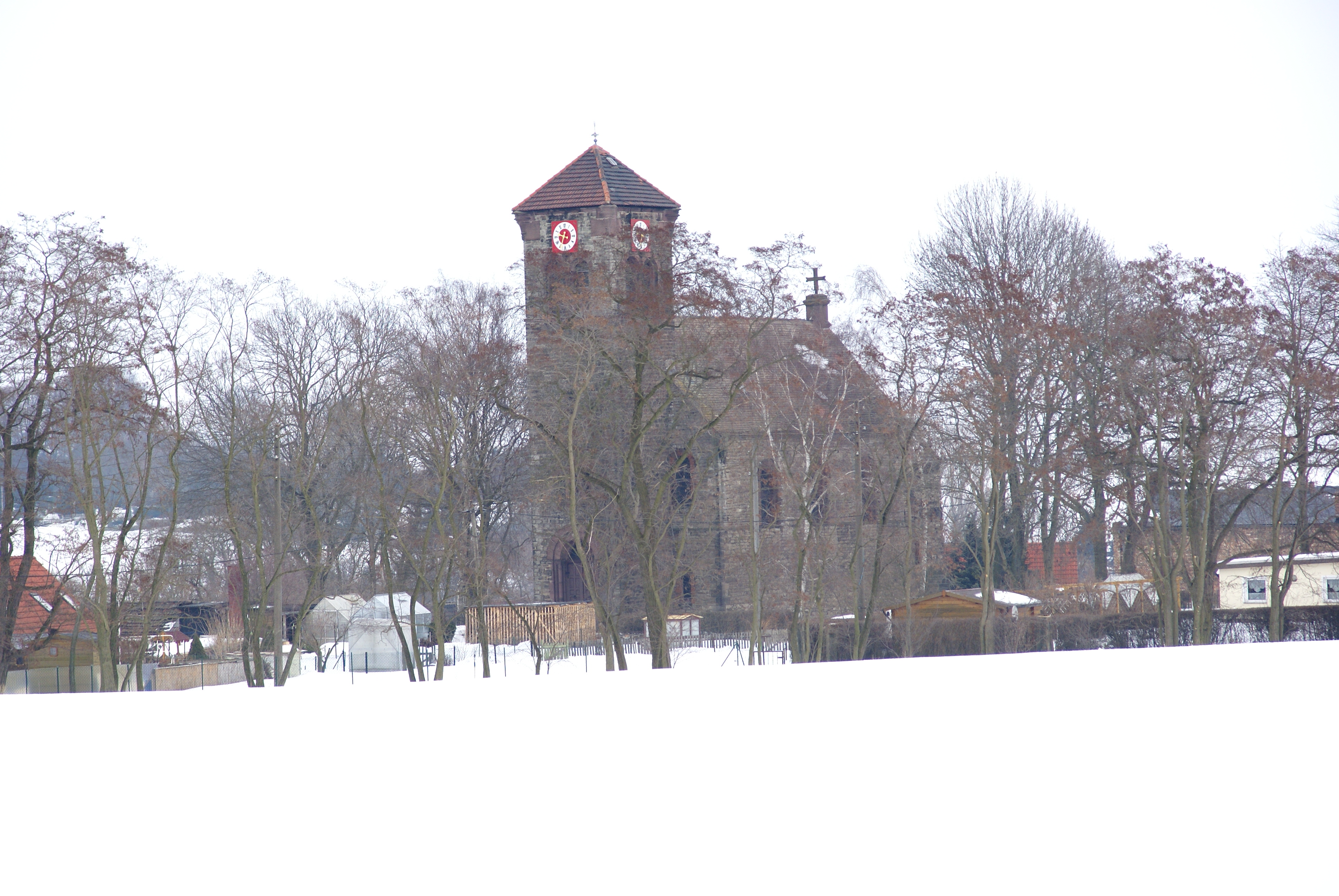 Die Dorfkirche von Augsdorf